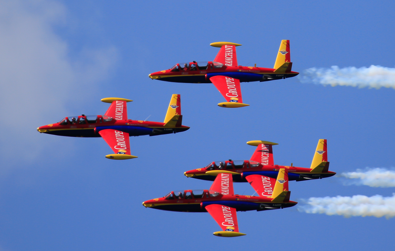 Fouga Magister CM 170 Patrouille Tranchant, 80 ans de la Patrouille d'Étampes